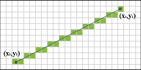 Illustration de l'algorithme de tracé de droite de Bresenham